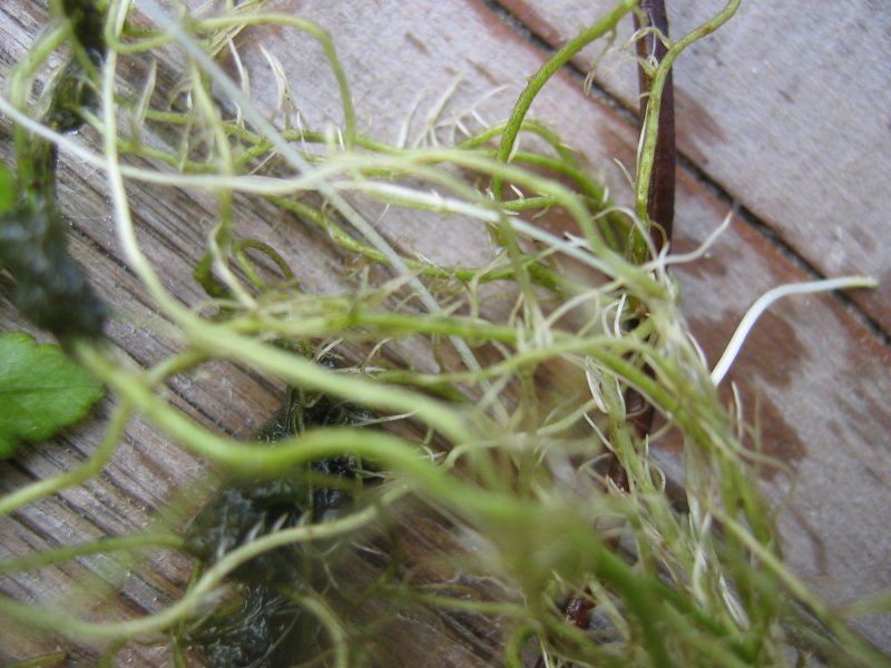 Wurzeln einer Berle Berula erecta